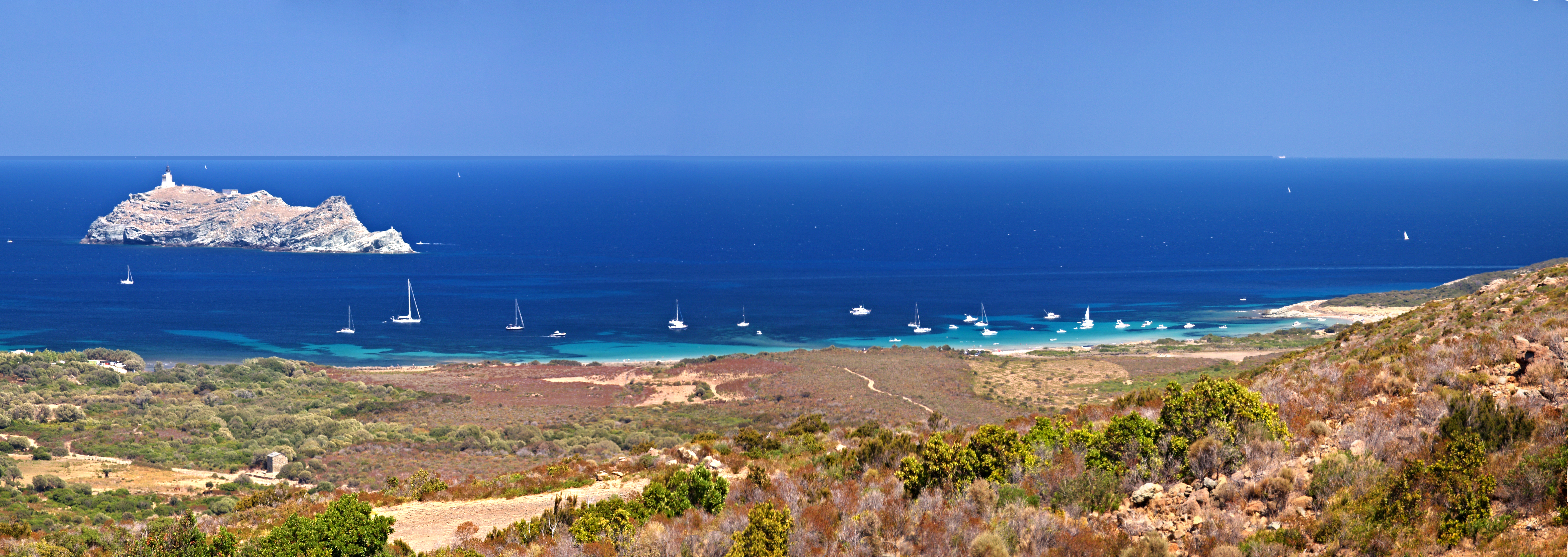 Ersa (Corsica) - Plage de Cala (Rogliano) et l'île de la Giraglia